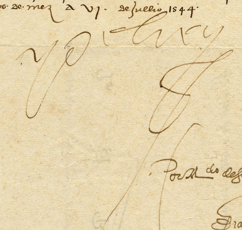 Firma del emperador Carlos V como Rey de Castilla y de Aragón